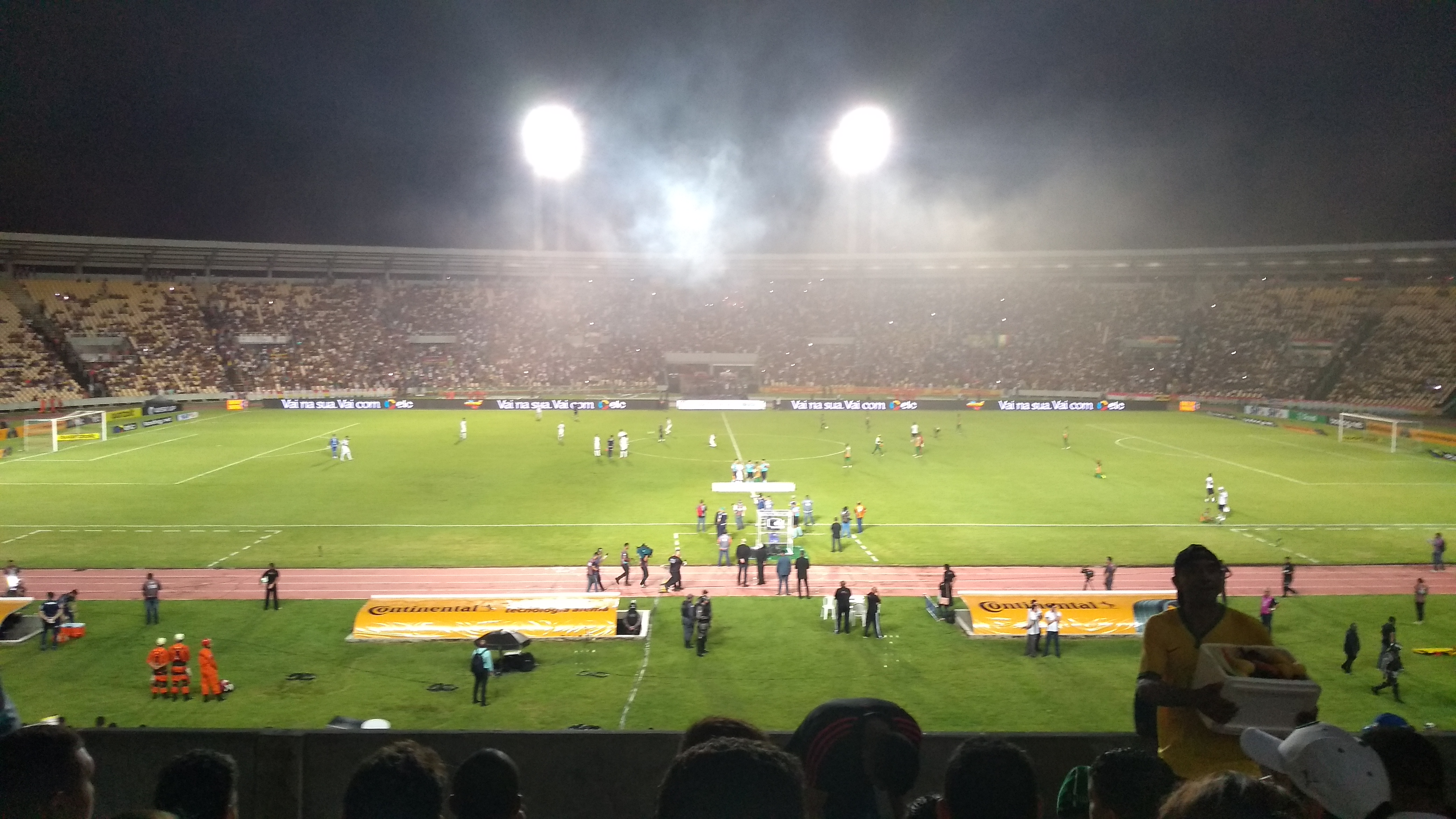 O Estádio Castelão em São Luís - MA, Brasil, durante o jogo entre Sampaio Corrêa e Palmeiras, válido pelas oitavas de final da Copa do Brasil de Futebol de 2019